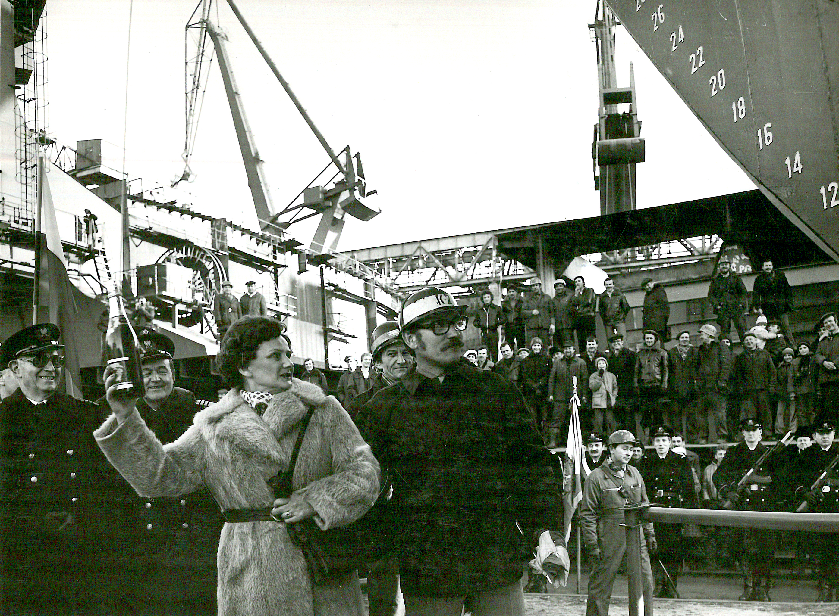 6.03.1982r.- Matka chrzestna Barbara Zielińska dokonuje tradycyjnej ceremonii chrztu okrętu butelką szampana.